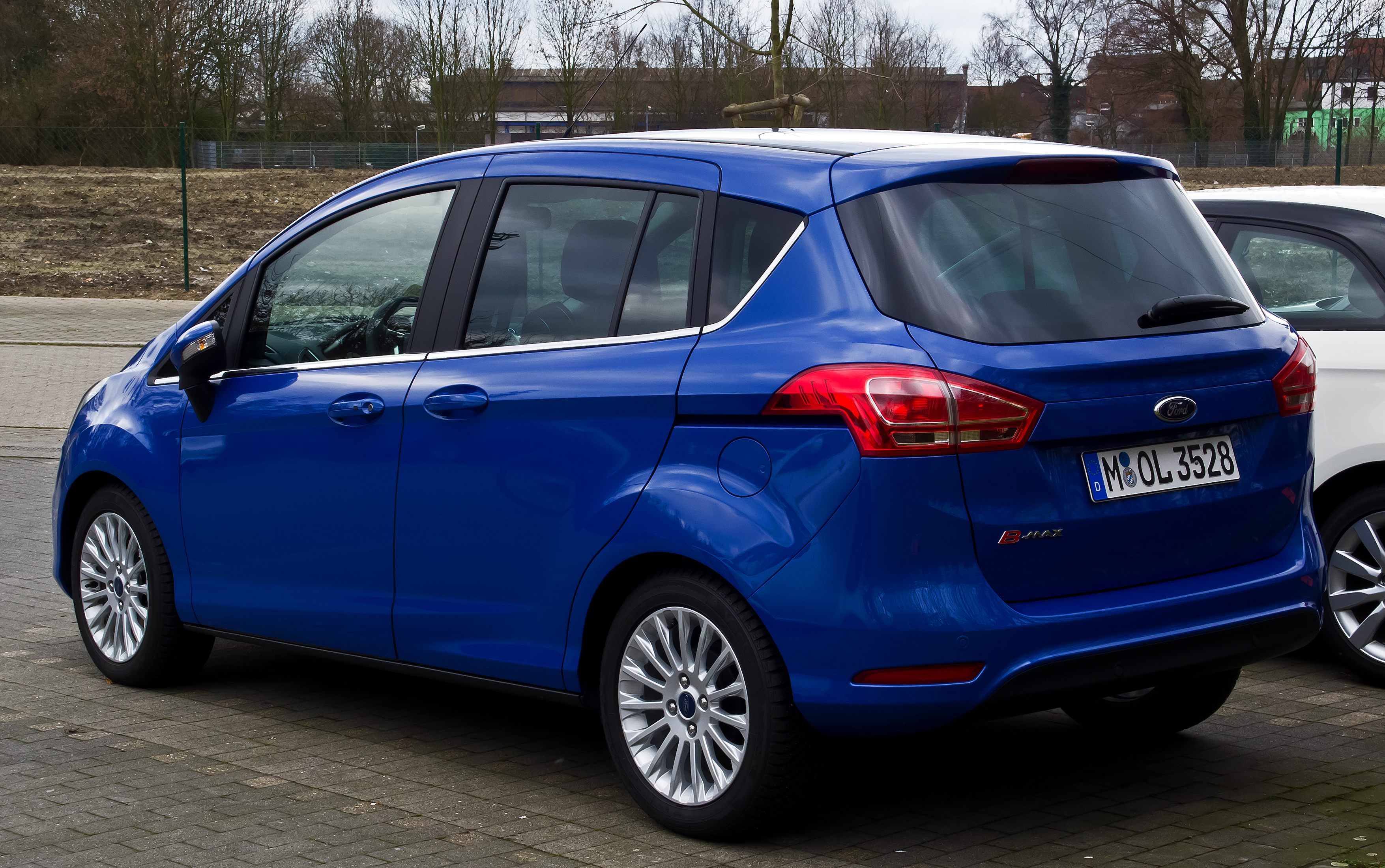 Ford B-Max Titanium